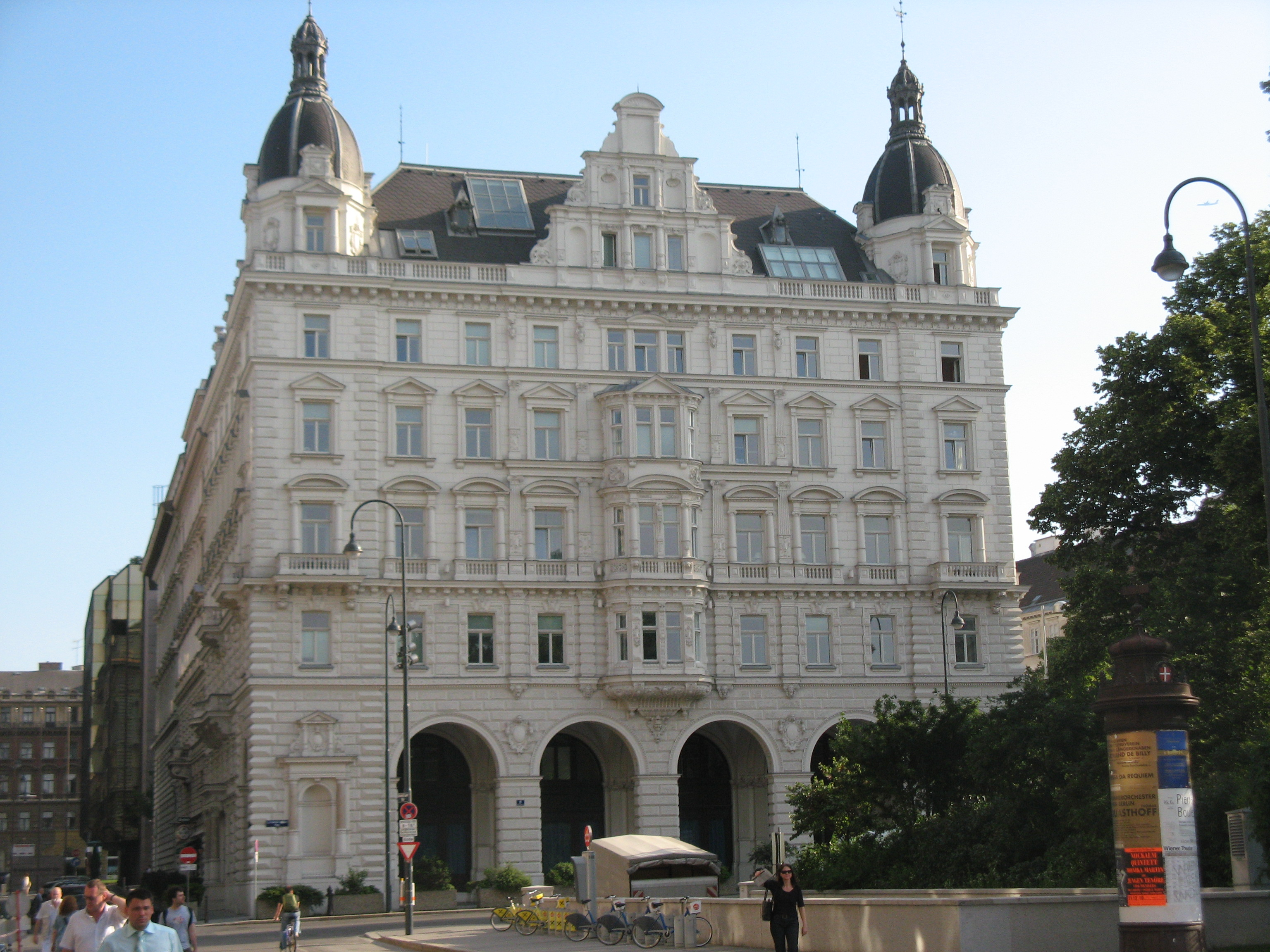 Arkadenhaus (1882) von Dionys Milch und Heinrich Hellin, Friedrich-Schmidt-Platz 2, Wien-Innere Stadt